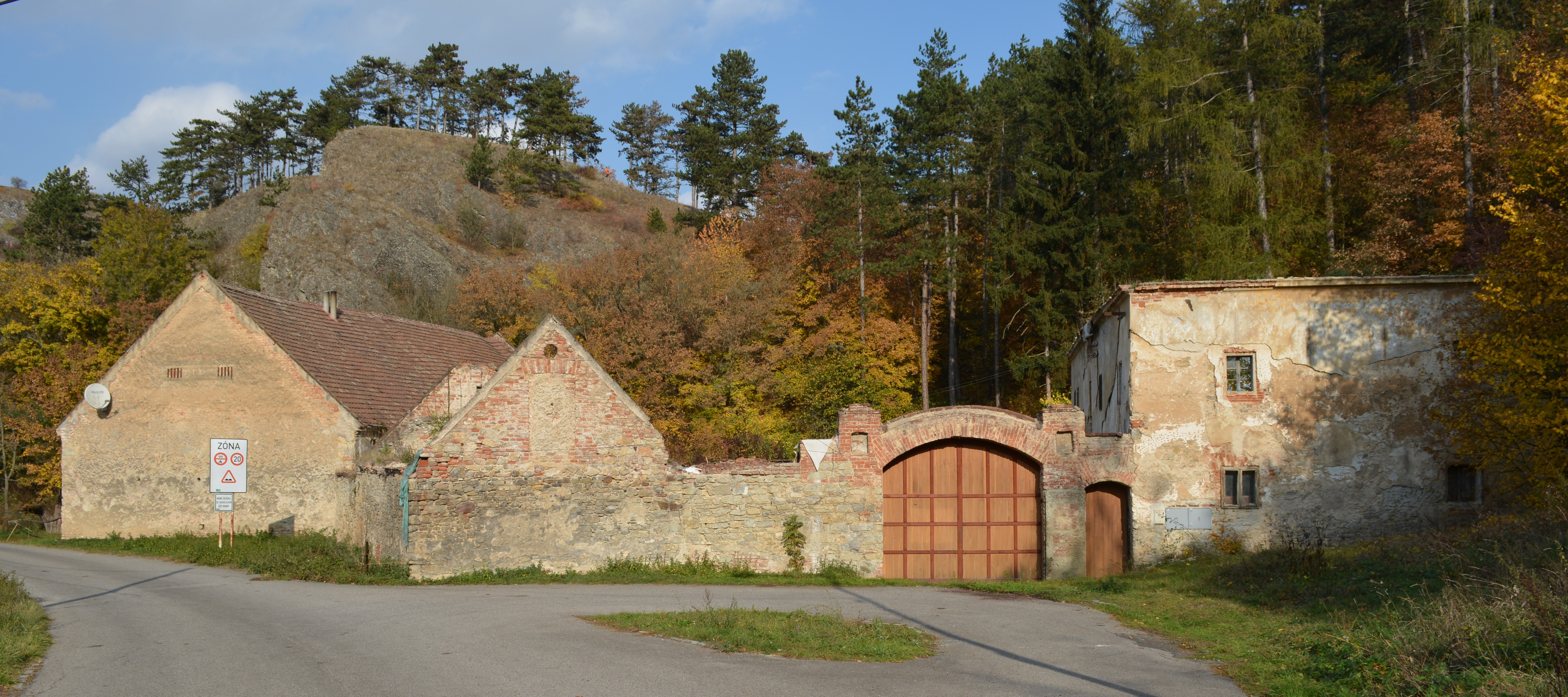 Chátrající budovy Klukovického mlýna v Dalejském údolí.